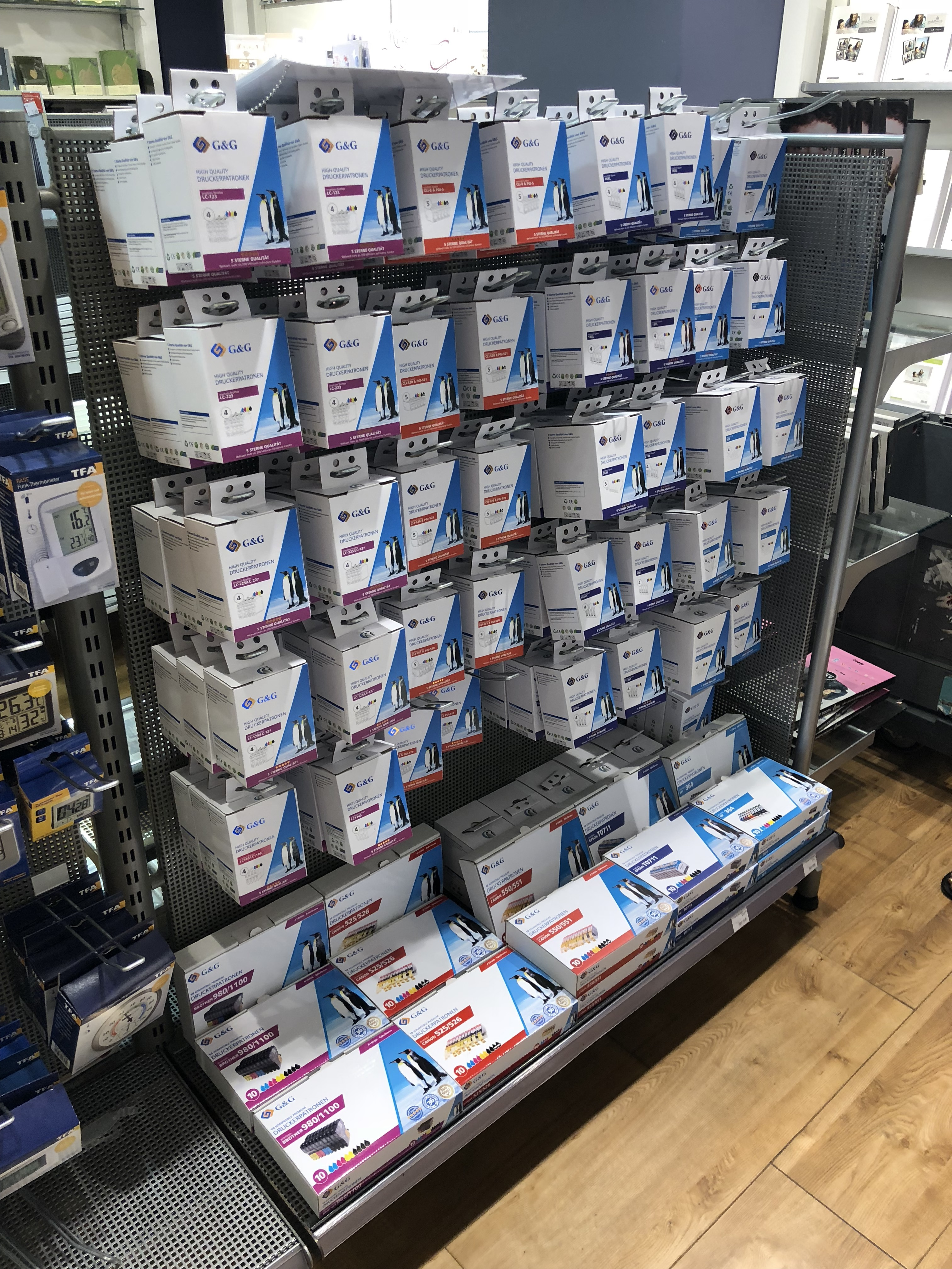 Ninestar G&G Druckerpatronen in einer Berliner Karstadt Filiale.